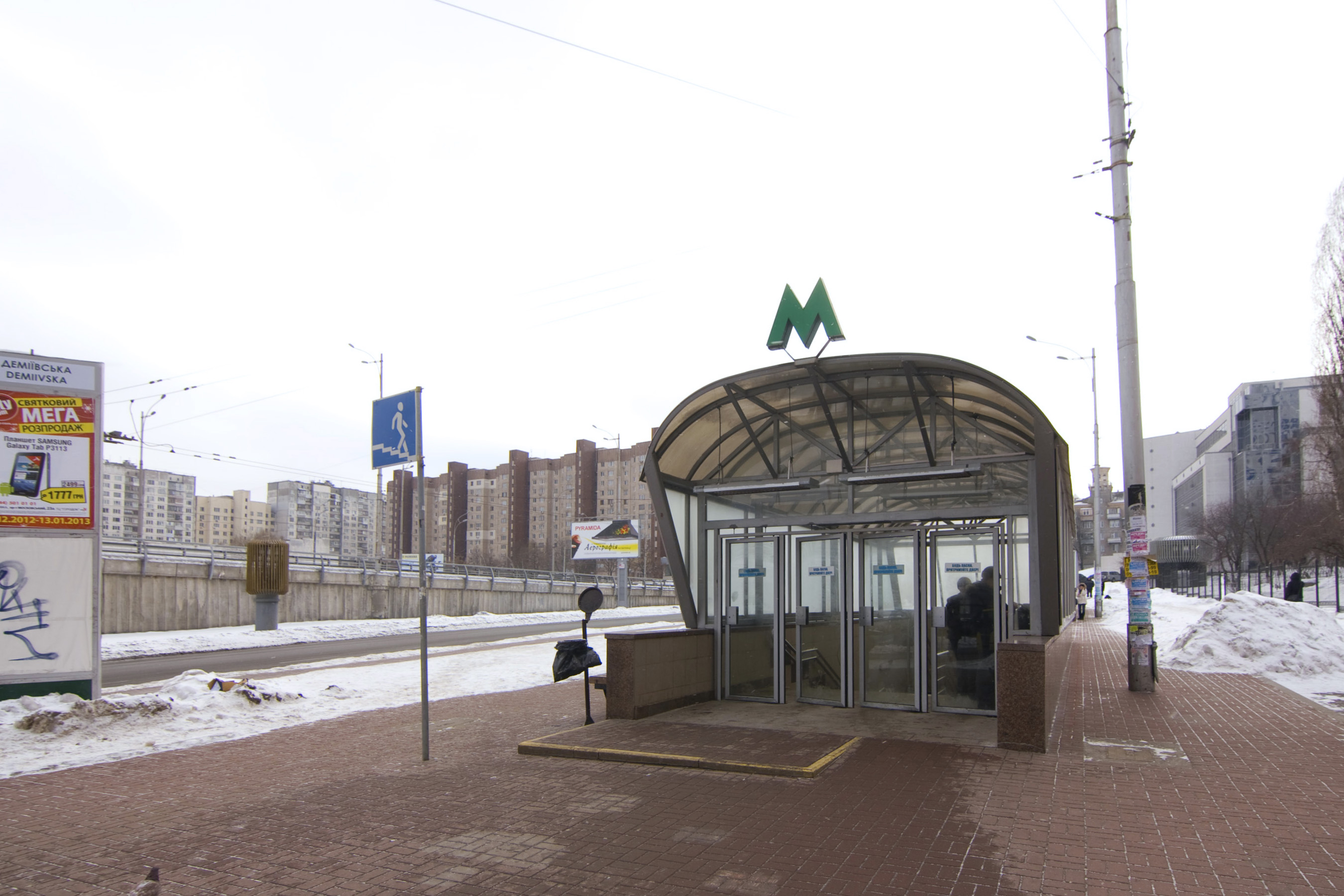 станція метро Деміївська, Київ